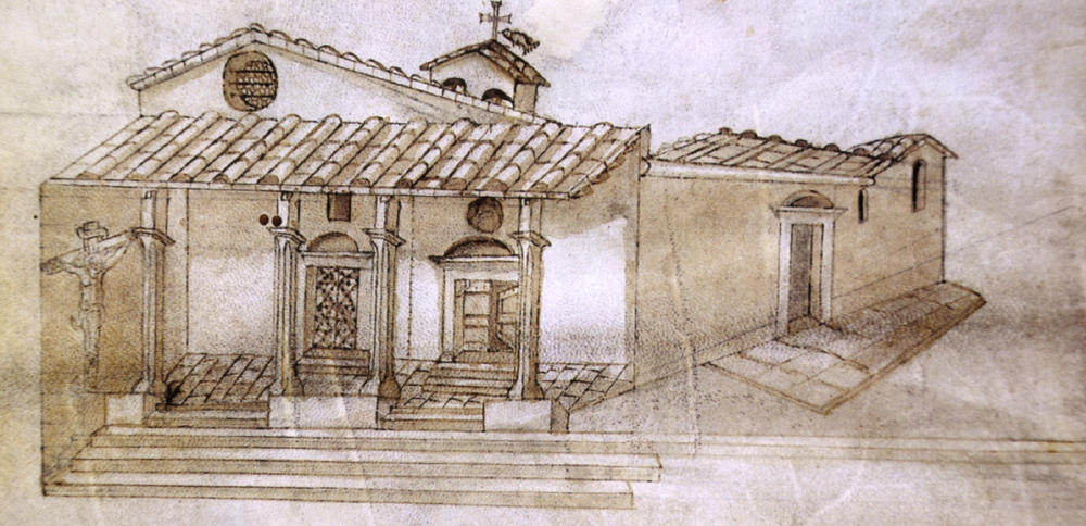 Chiesa di santa maria a ripalta di pistoia, disegno del 1582